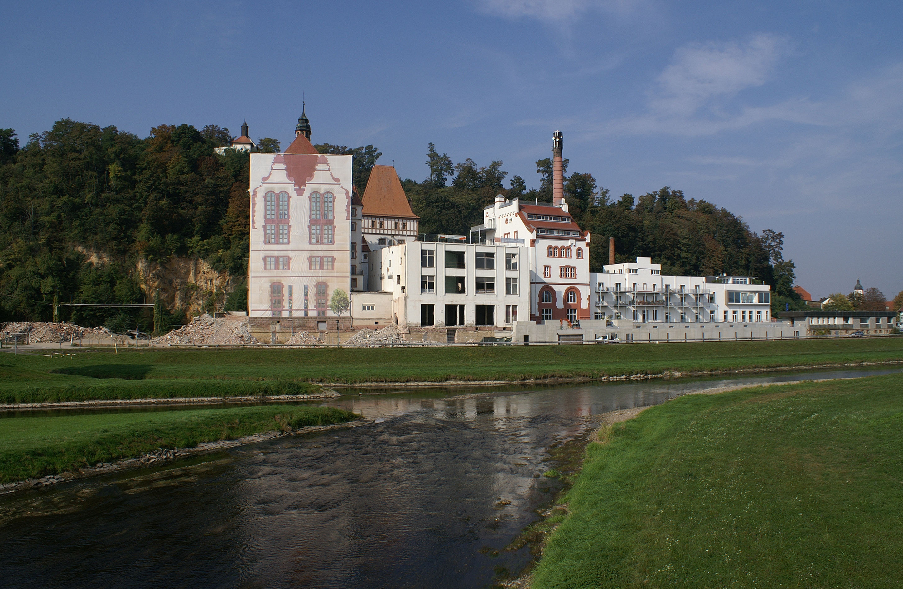 Die ehemalige Brauerei am Fuß des Michaelsbergs in Riegel am Kaiserstuhl, links münden die Dreisam und die Alte Dreisam (hinten) in die Elz